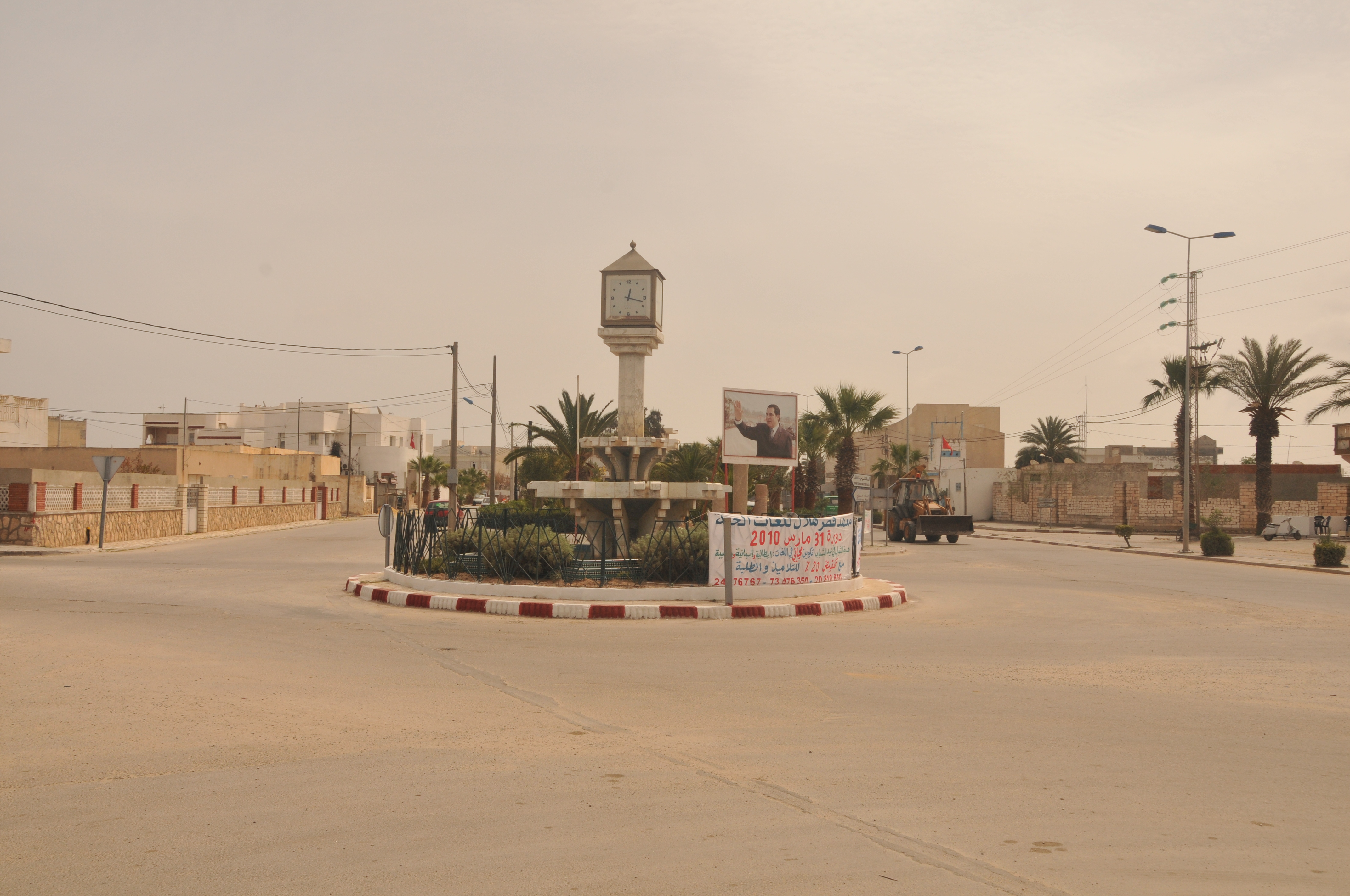 Carrefour principal à Bekalta, village à 15 km de Mahdia dans le Sahel tunisien